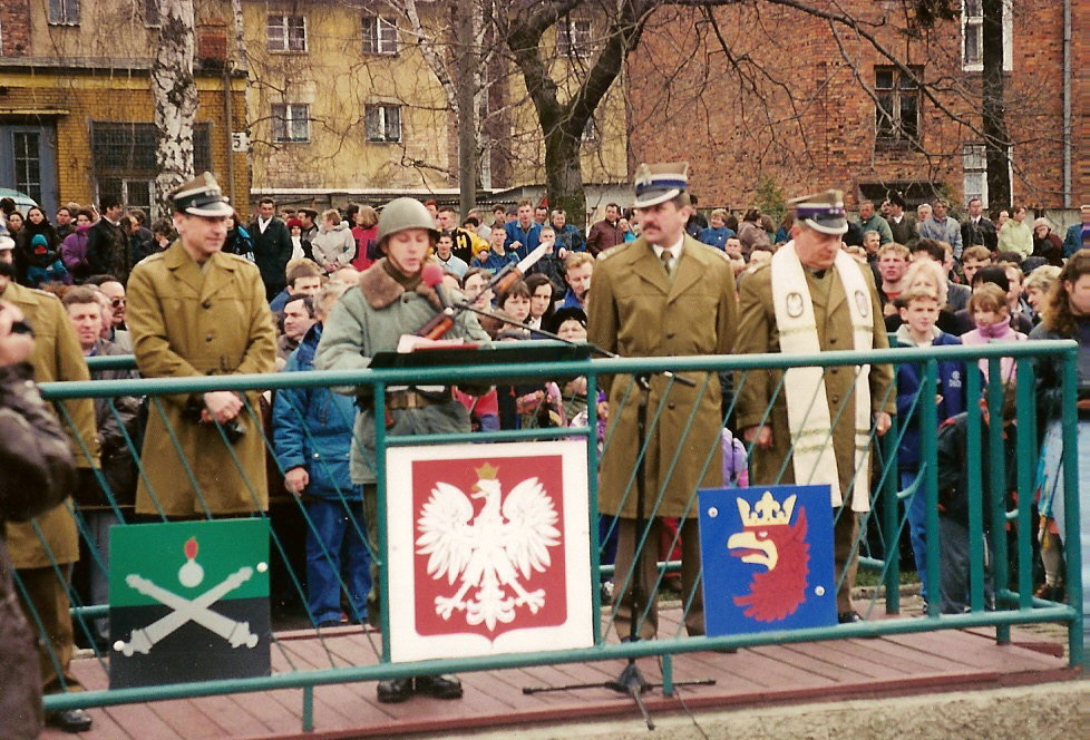 Trybuna honorowa 2 Pułku Artylerii Mieszanej w Szczecinie. Przysięga wojskowa. Po prawej stronie przemawiajacego szeregowego stoi dowódca pułku płk. Korytkowski